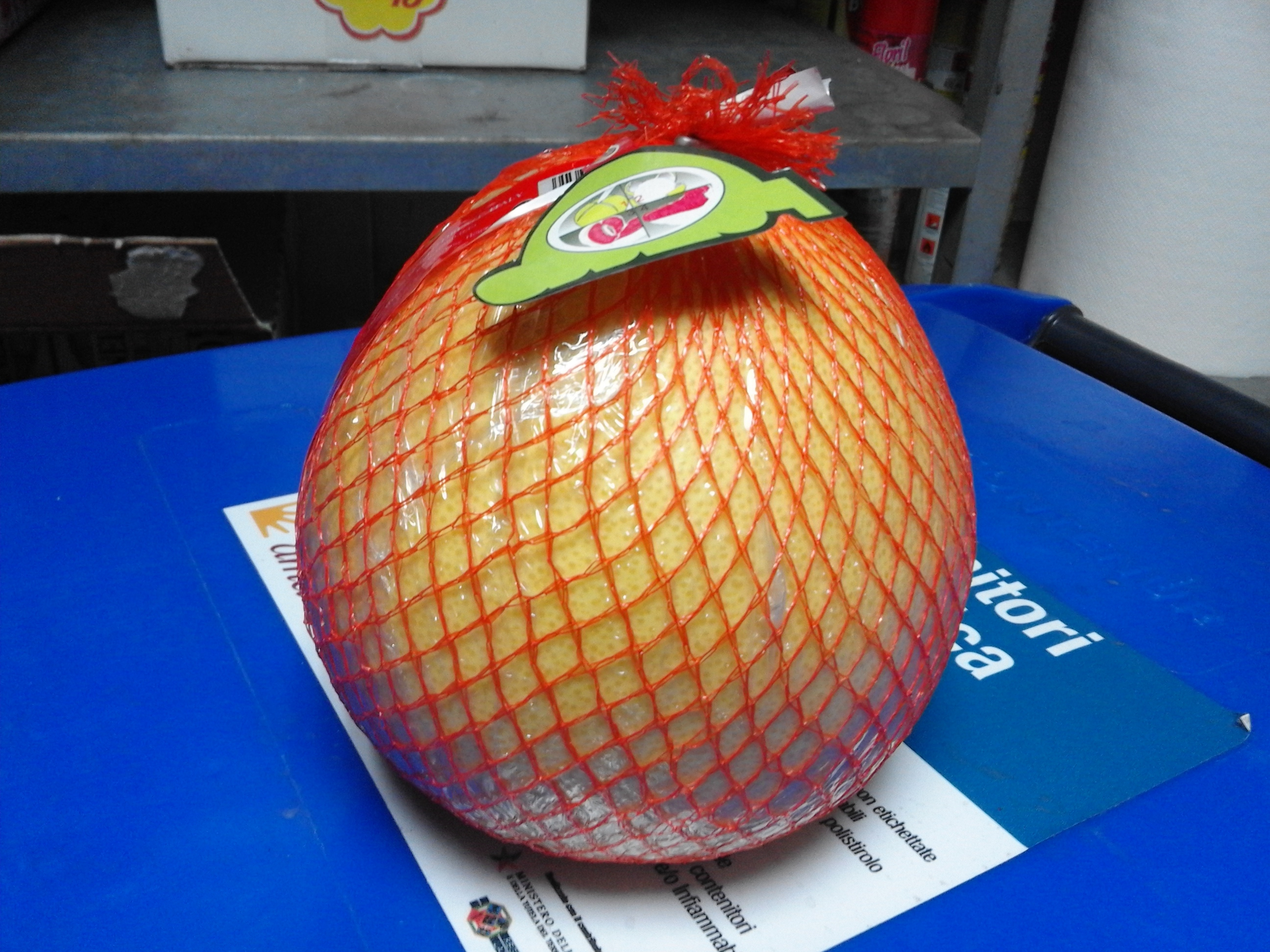 Citrus maxima